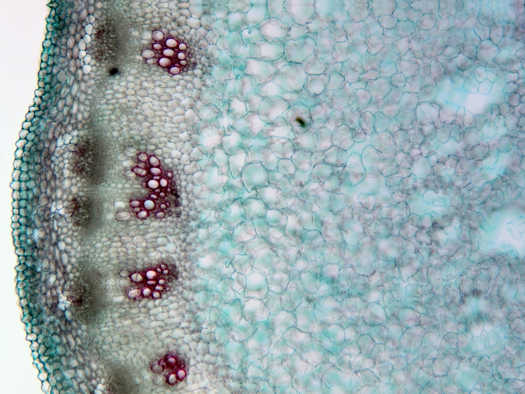 Alliaria petiolata